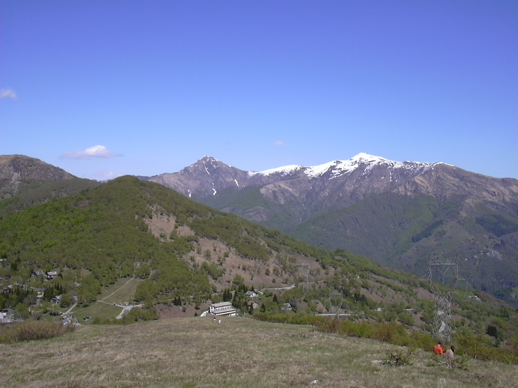 Lema mountain